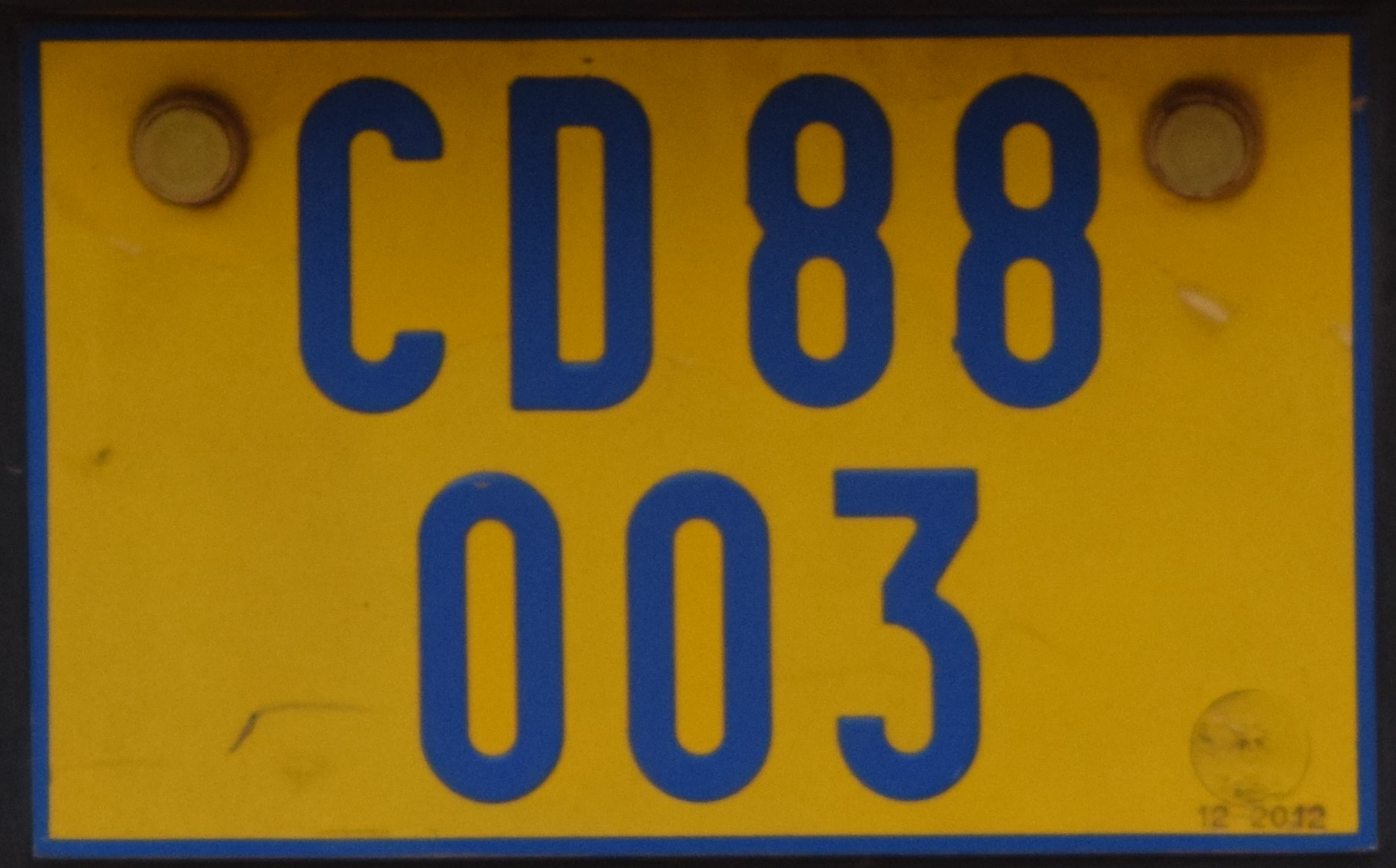 CD kentekenplaat Cambodja